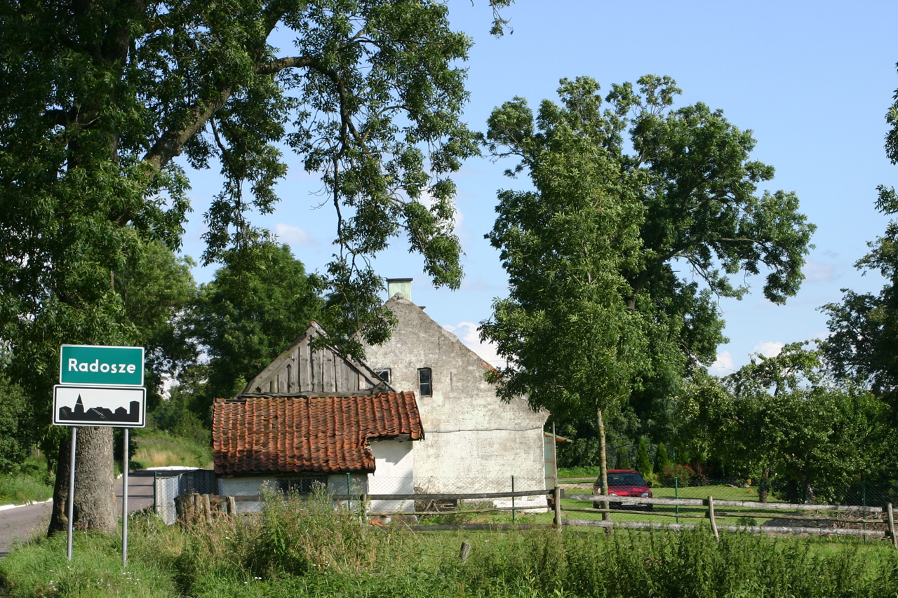 Radosze